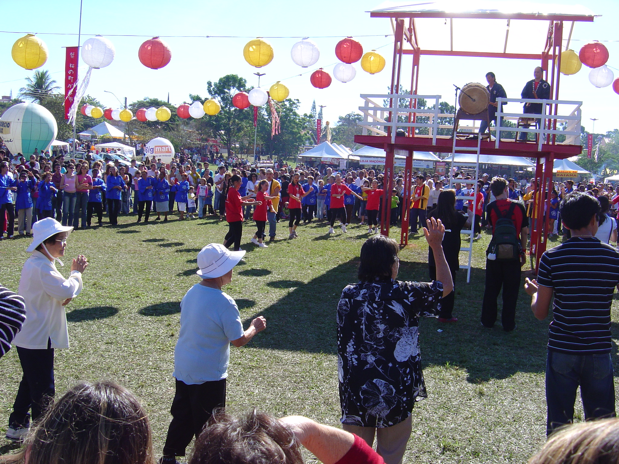 Public